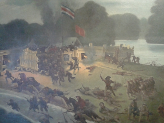 Combate de La Angostura, óleo sobre tela, de Lorenzo Fortino (1860). Museo Histórico Cultural Juan Santamaría, Alajuela, Costa Rica. El Combate de La Angostura fue una batalla que se llevó a cabo en la ciudad de Puntarenas, Costa Rica, el 28 de septiembre de 1860, entre las tropas del ejército costarricense a las órdenes de Máximo Blanco y los rebeldes leales al derrocado presidente Juan Rafael Mora Porras